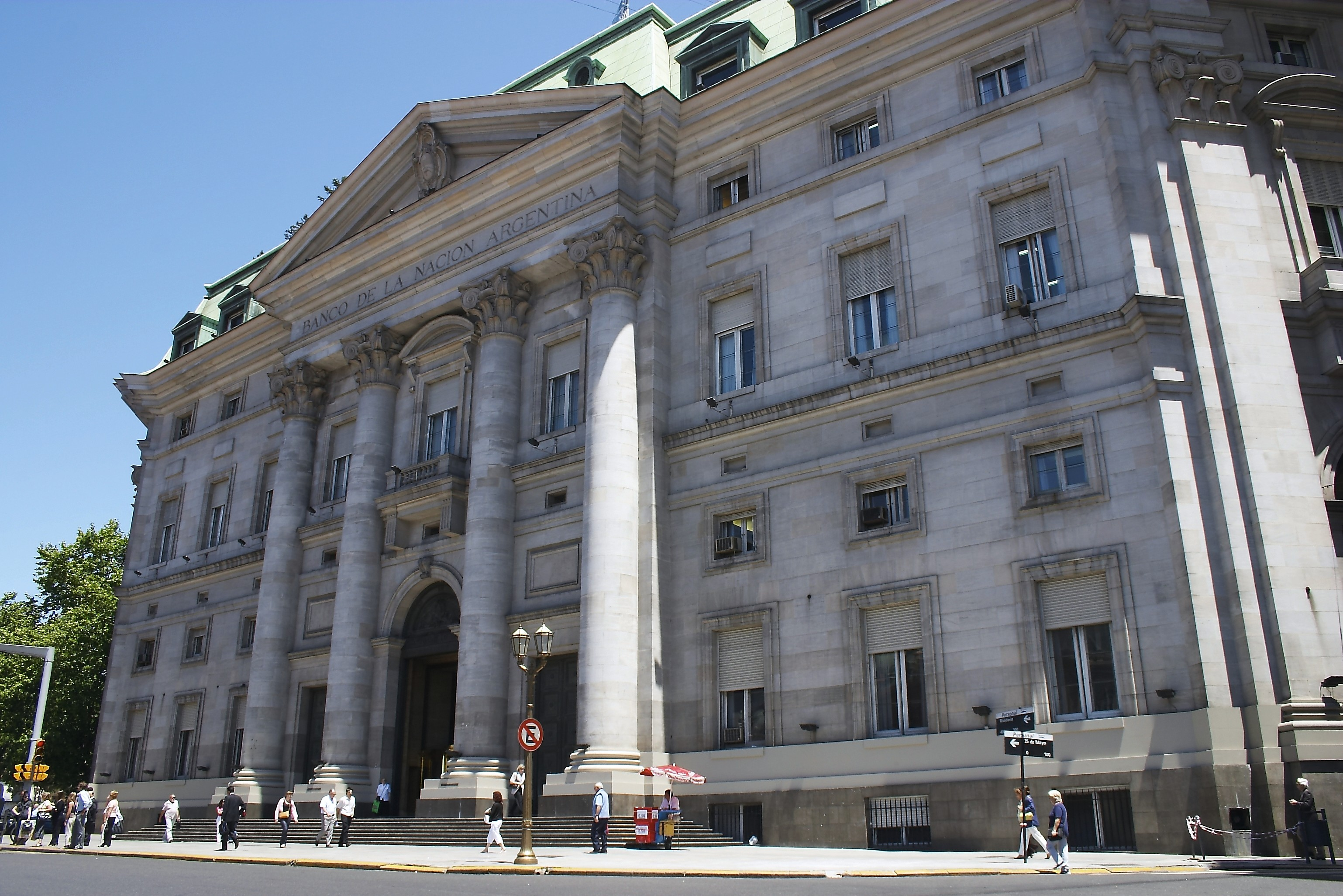 Banco de la Nación Argentina, Casa Central y Sucursal Plaza de Mayo, Buenos Aires, Argentina. Entre 1857 y 1888 funcionó en éste predio el Teatro Colón. Luego entre 1940 y 1955 se construyó este edificio proyectado por Alejandro Bustillo.